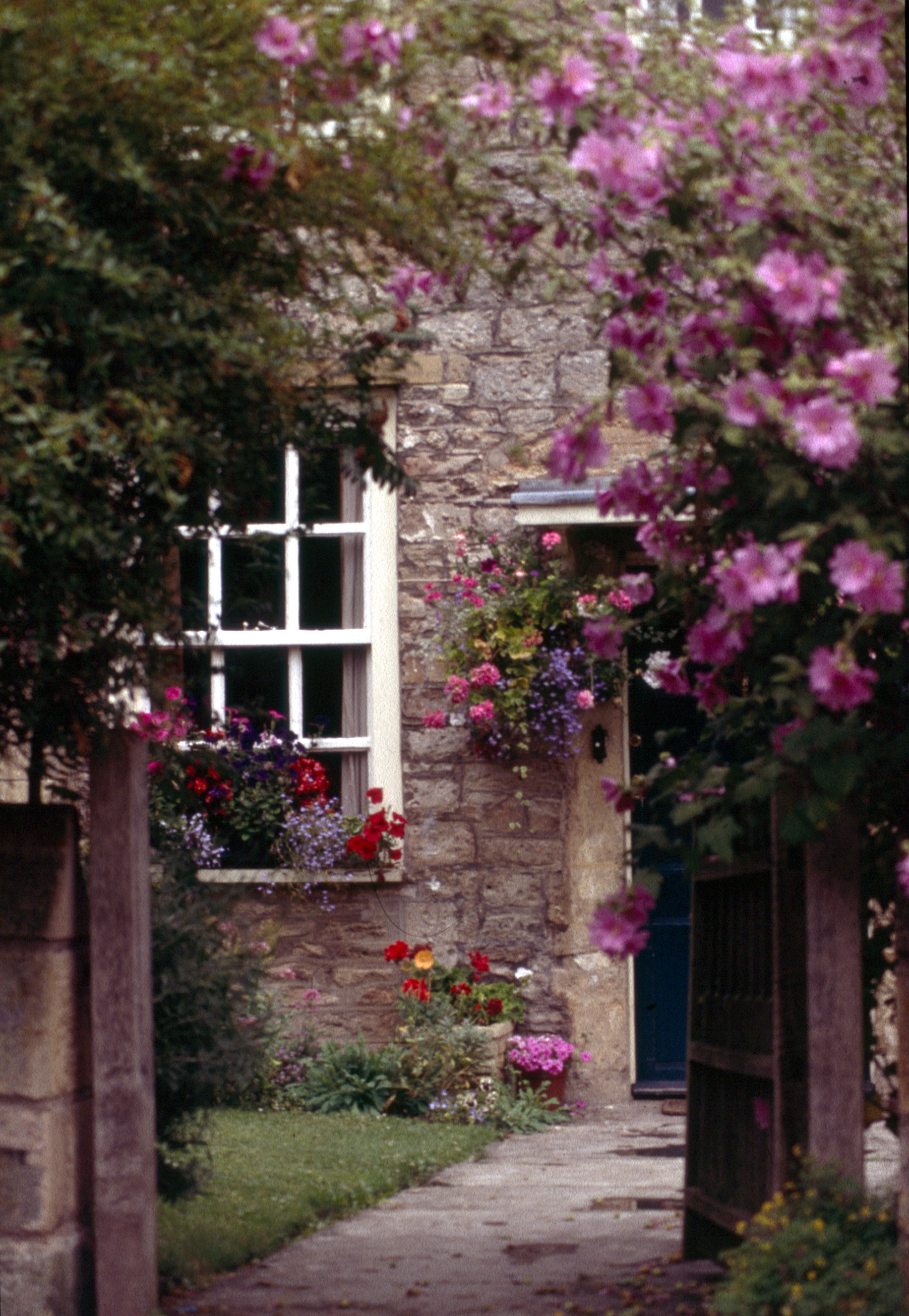 Wells, England